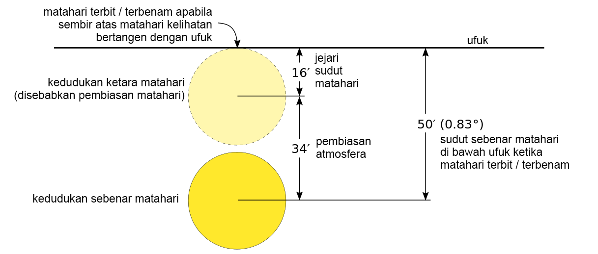 Gambar rajah matahari ketika matahari terbit atau matahari terbenam, menunjukkan kesan pembiasan atmosfera.